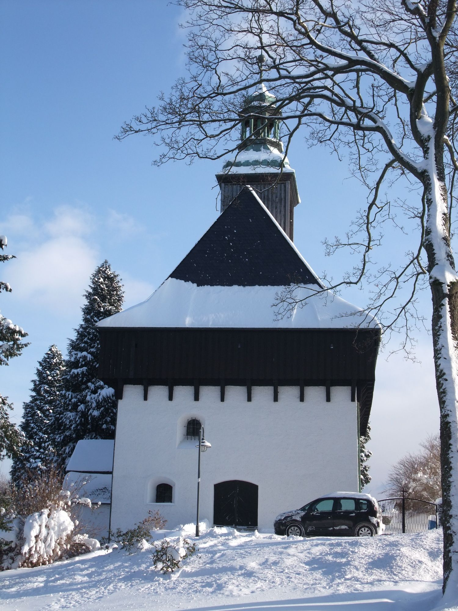 Die Wehrkirche in Lauterbach (Erzgebirge) von Westen gesehen.